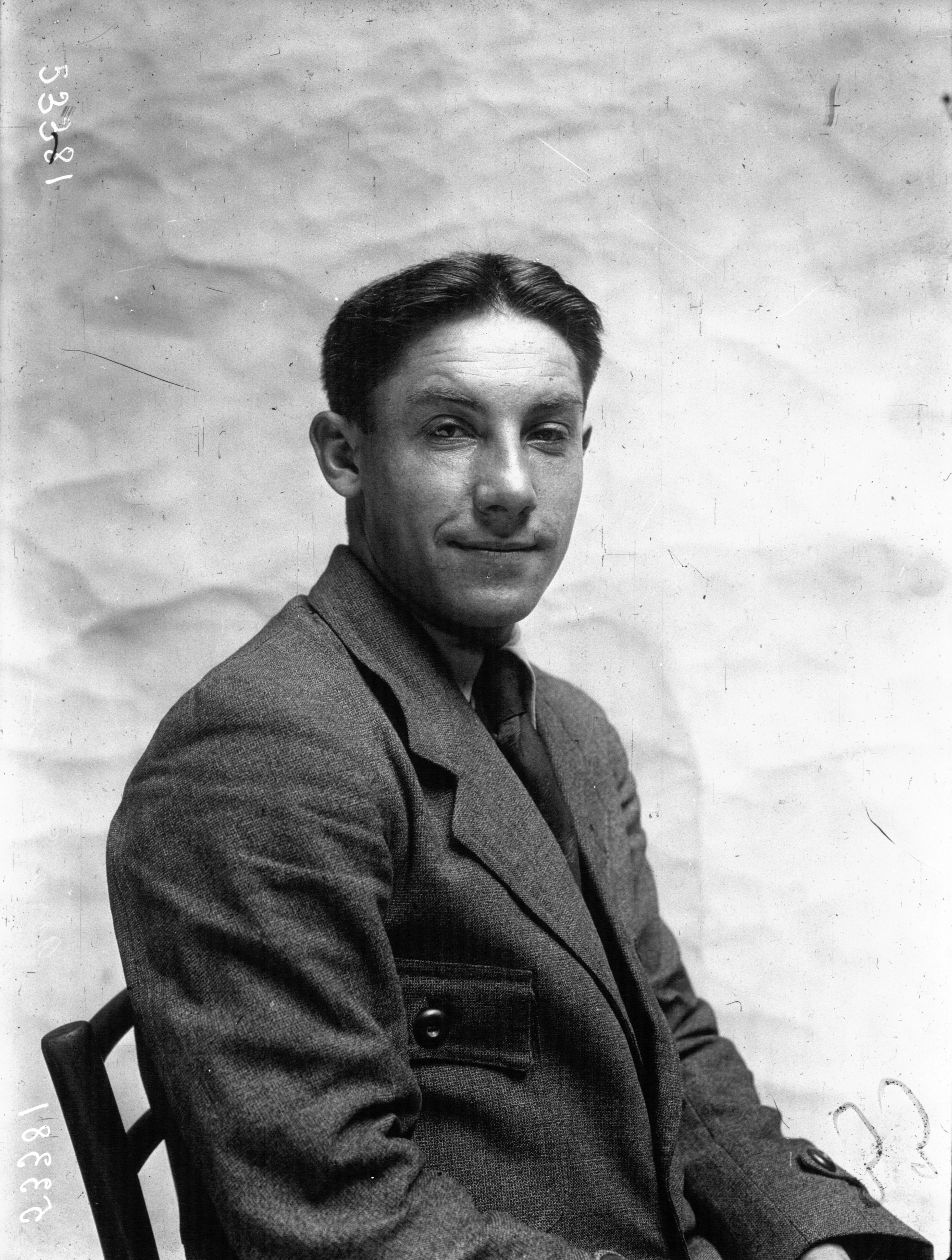 Coureurs du Tour de France : Girardengo.